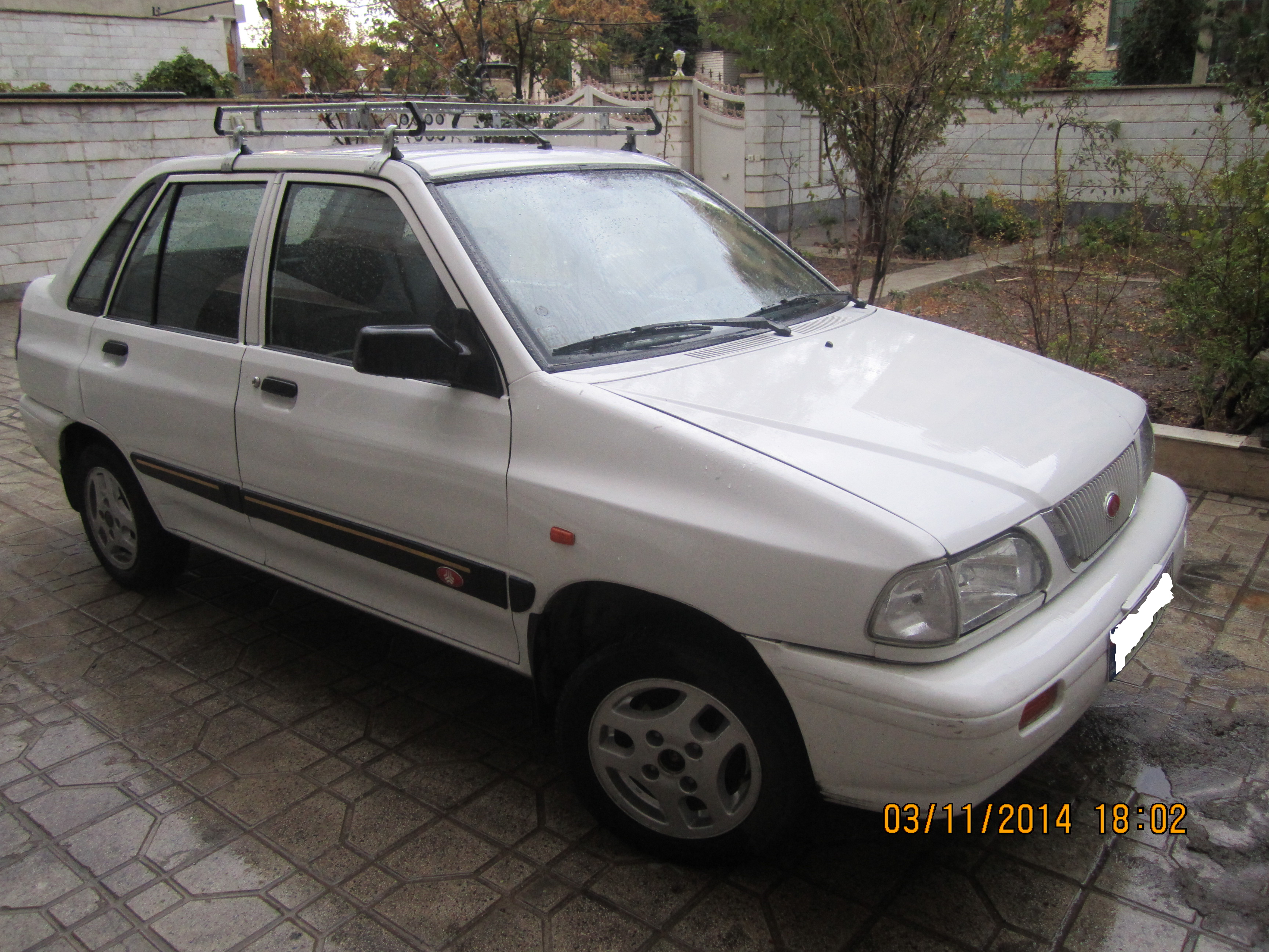 سایپا 141